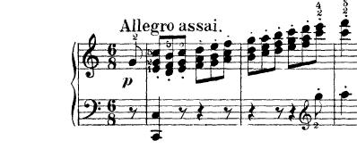 Compassos iniciais do quarto movimento da Sonata Op. 2 n. 3 de Beethoven